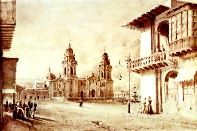 La catedral y la plaza principal de Lima. Siglo XIX.